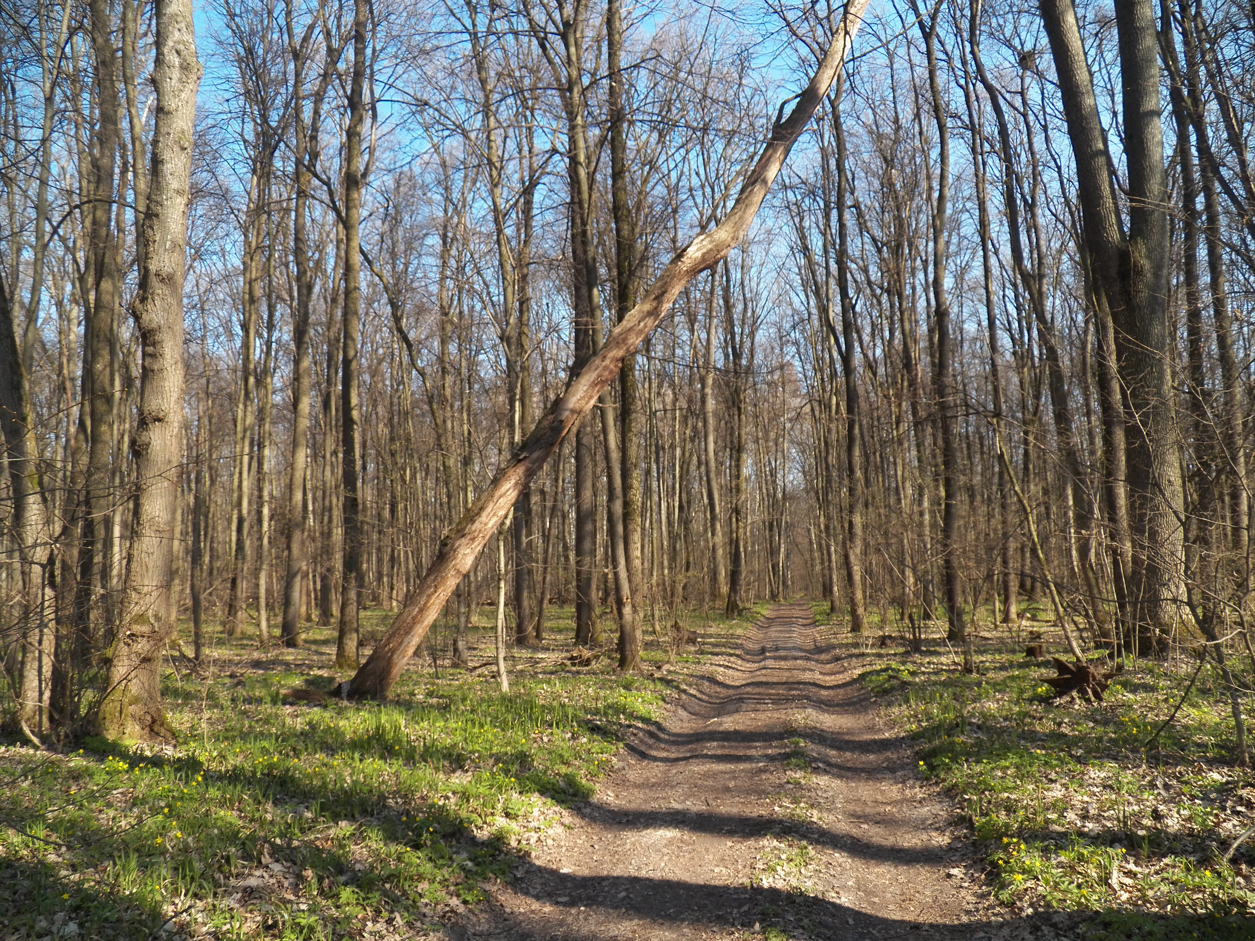 «Калитянська Дача», Броварський район, Калитянська та Заворицька сільські ради